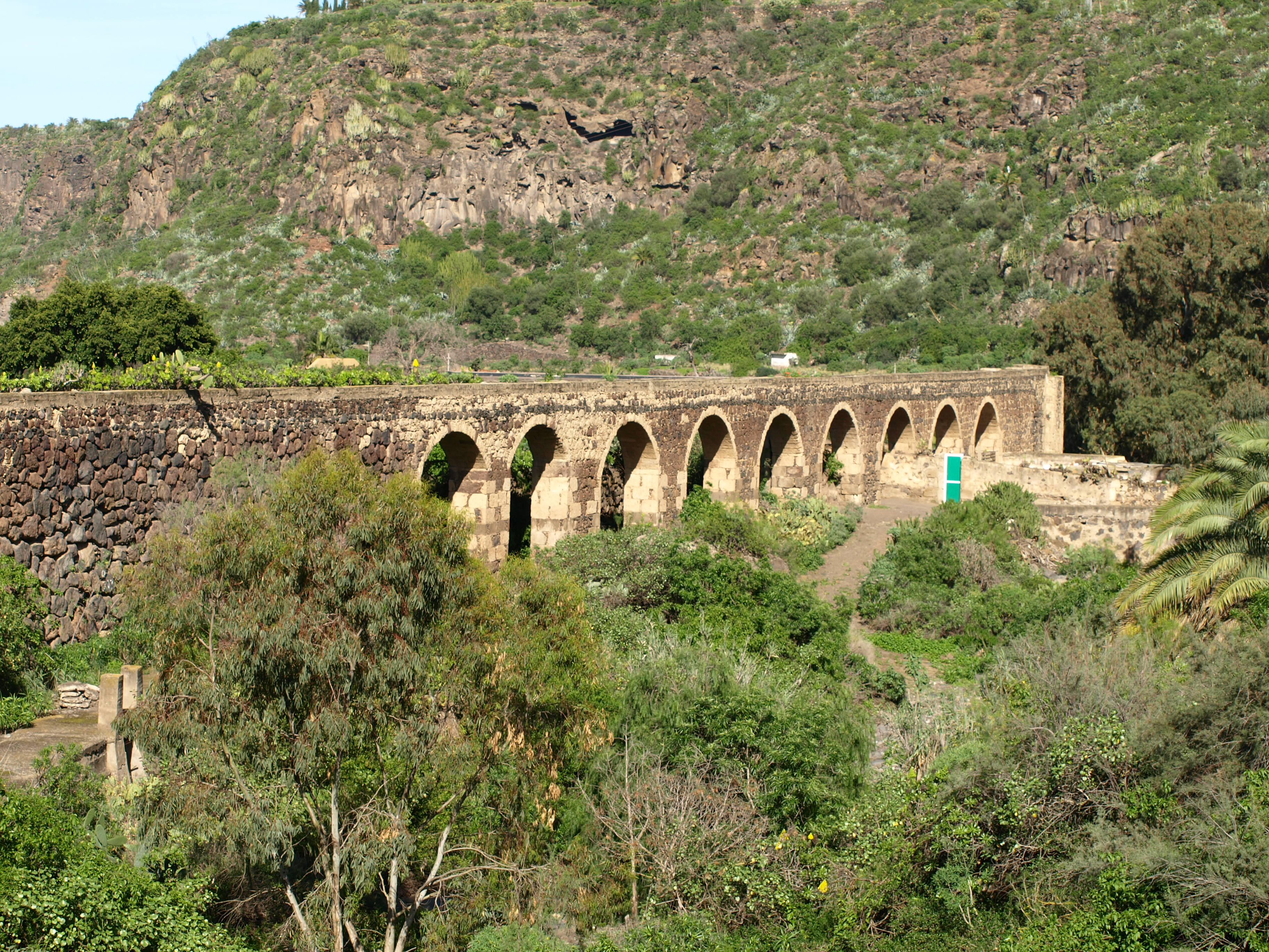 Vista del Barranco Guiniguada desde el Jardín Botánico Viera y Clavijo.